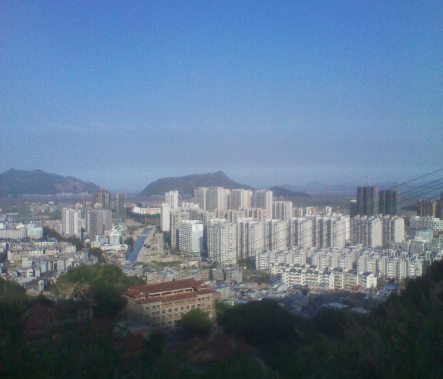 从山上俯瞰霞浦县县城